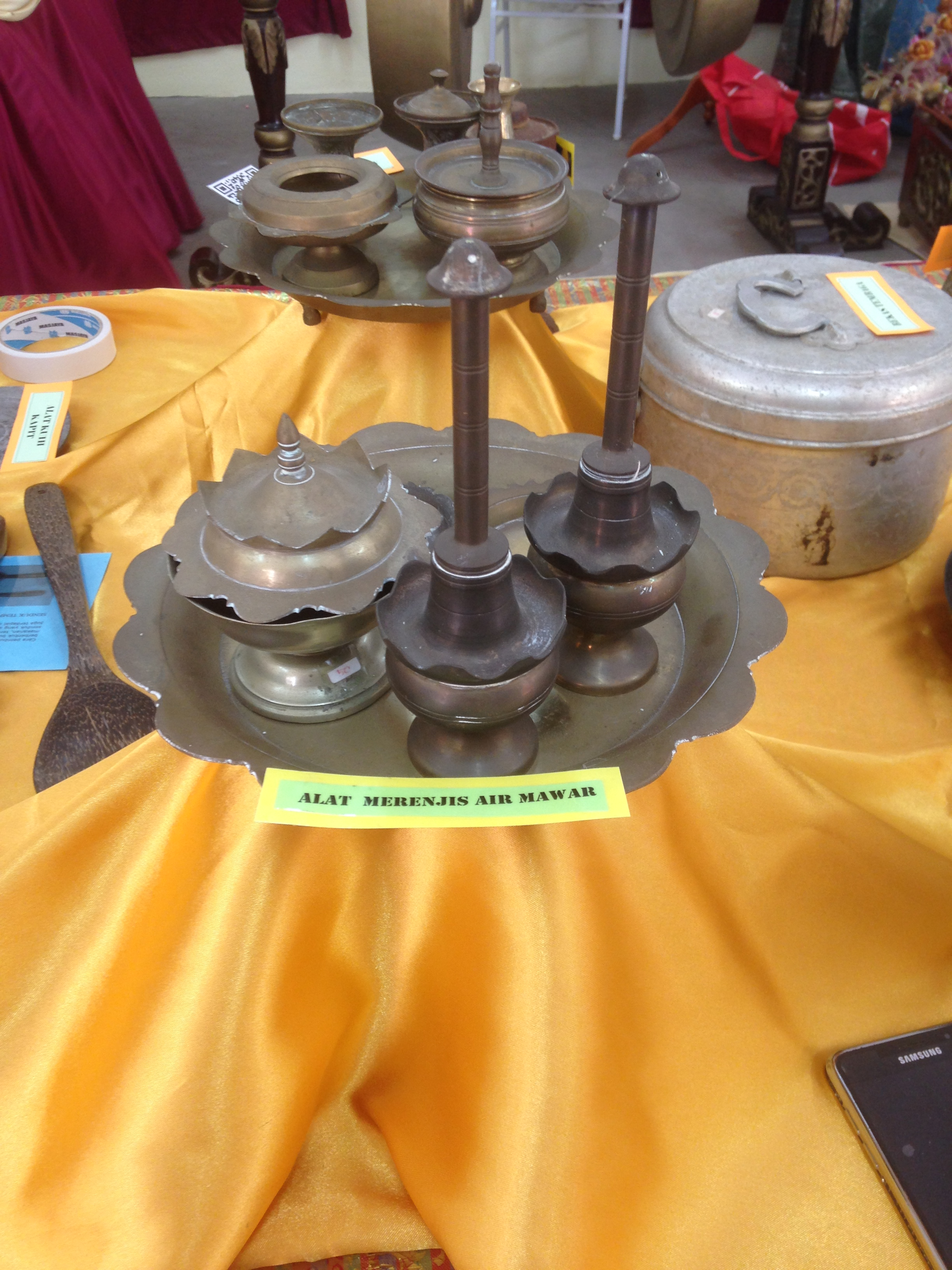 ALAT MERENJIS AIR MAWAR